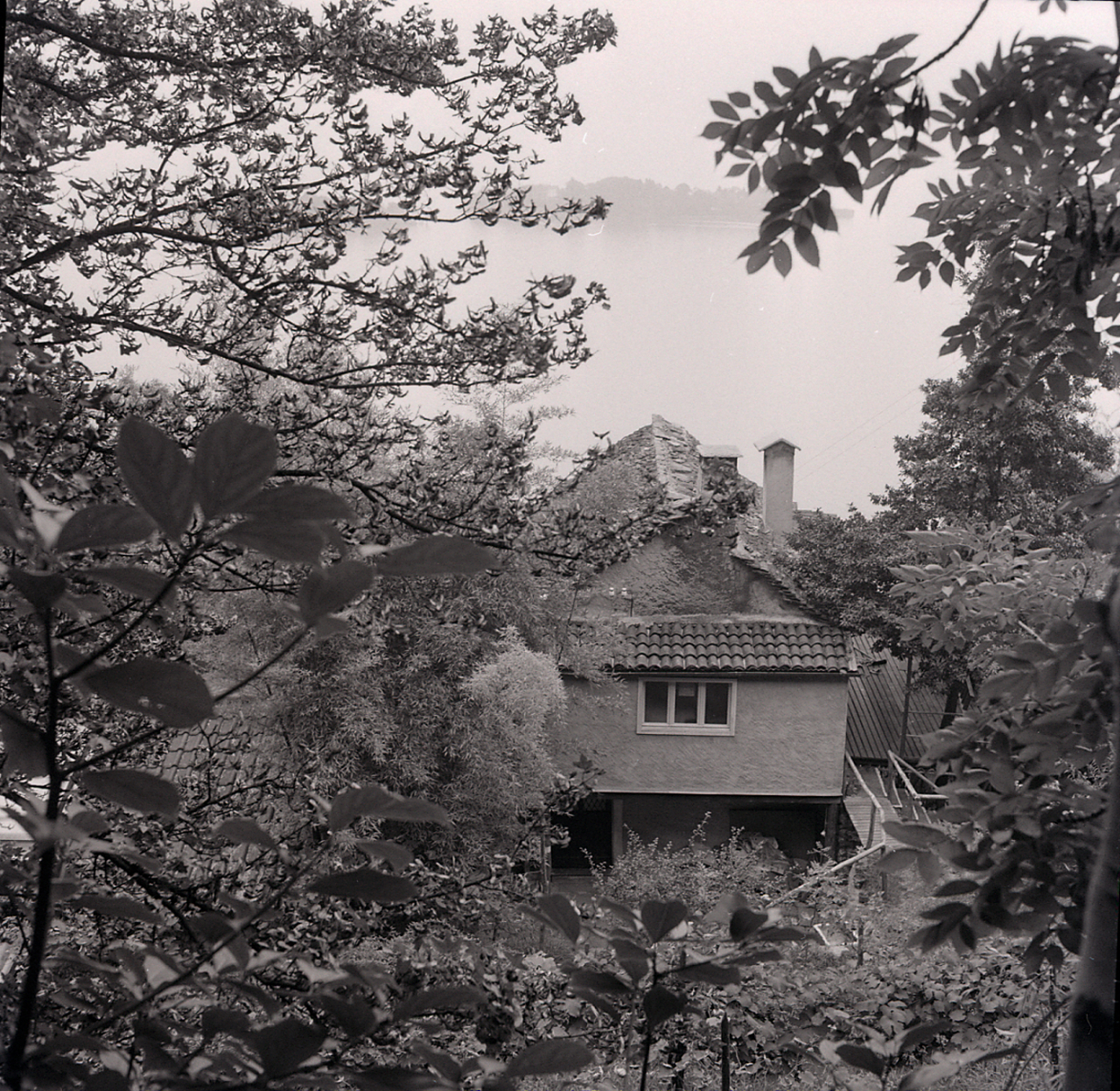 Servizio fotografico : Italia, 1960 / Paolo Monti. - Buste: 9, Fototipi: 9 : Negativo b/n, gelatina bromuro d'argento/ pellicola ; 6X6. - ((Serie costituita da 9 buste di negativi identificati con i nn.: 14335, 14336, 14337, 14338, 14339, 14340, 14341, 14342, 14343, e tenute insieme da una graffetta. . - Sulla busta identificata con il n. 14335 iscrizione didascalica manoscritta a pennarello nero: "Ben/ Nicholson". - La mostra si tenne nel mese di novembre del 1960 e ha inaugurato la stagione espositiva della sede milanese della Galleria. - Occasione: Documentazione dello studio di Ben Nicholson e ritratti dell'artista per catalogo della mostra alla Galleria Lorenzelli: "Ben Nicholson", catalogo della mostra, Milano 1960, Bergamo, Tip. Conti, 1960. - Fonte: Monografia: Ben Nicholson, Bergamo, Tip. Conti (1960)